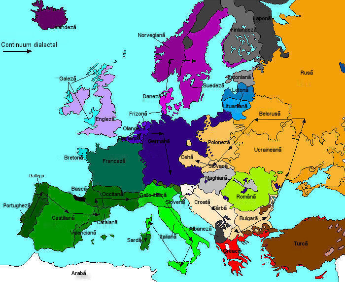 דיאלקט קונטינואום באירופה